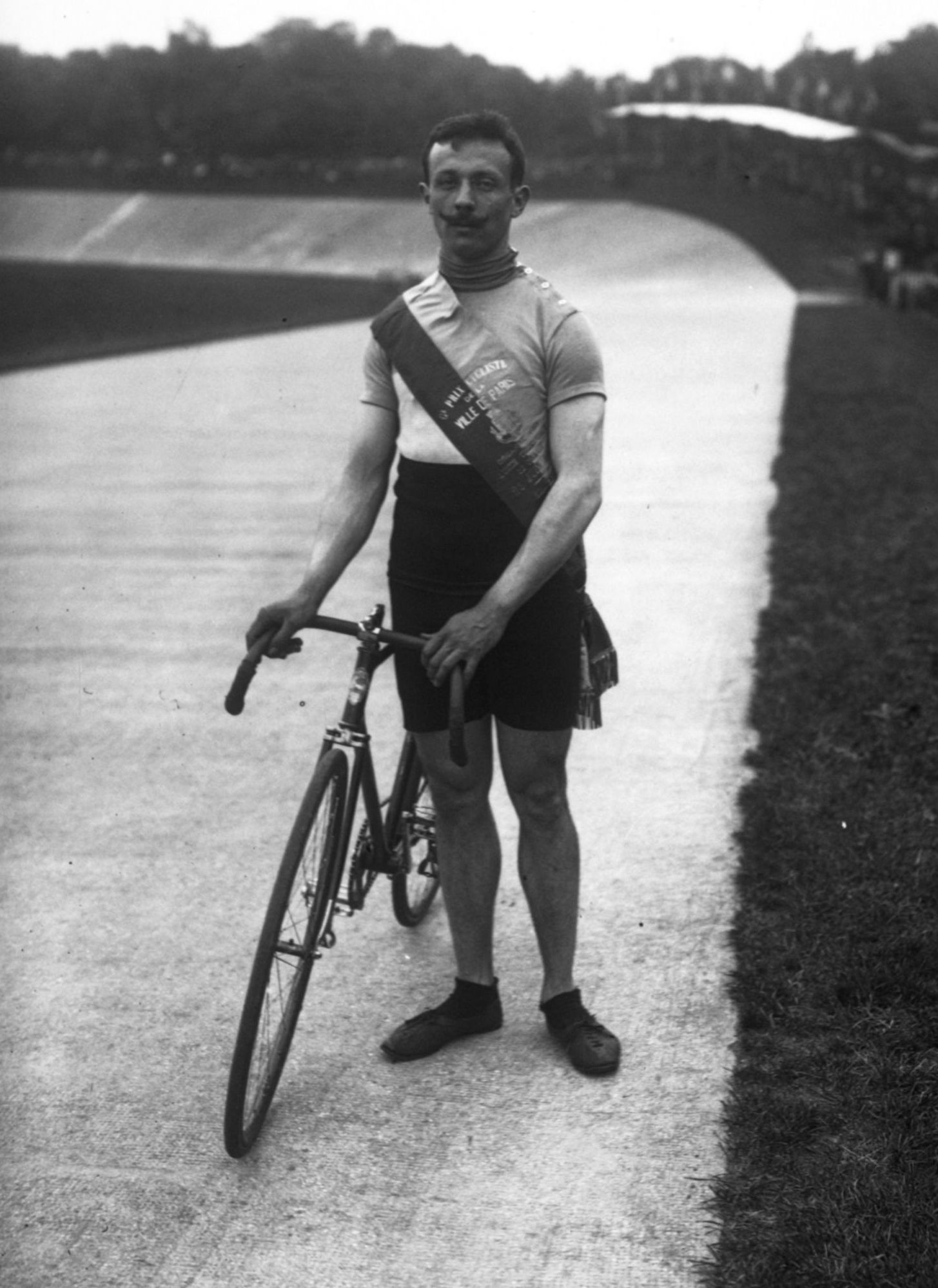 Émile Demangel portrait du coureur cycliste avant le départ